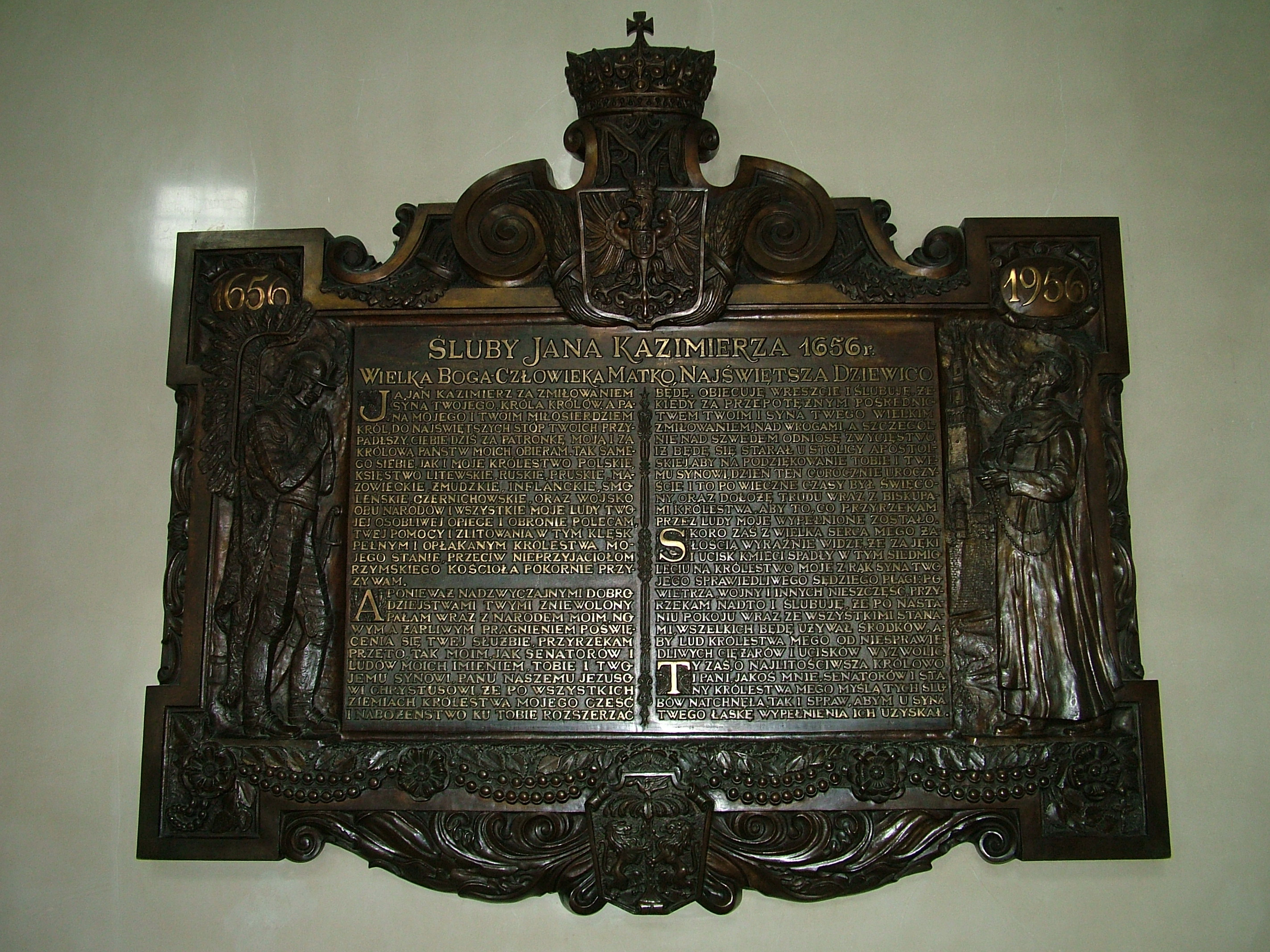 Tablica z tekstem ślubów lwowskich (Częstochowa - Jasna Góra), 4 sierpnia 2005 Autor: Stanisław Kosiedowski.